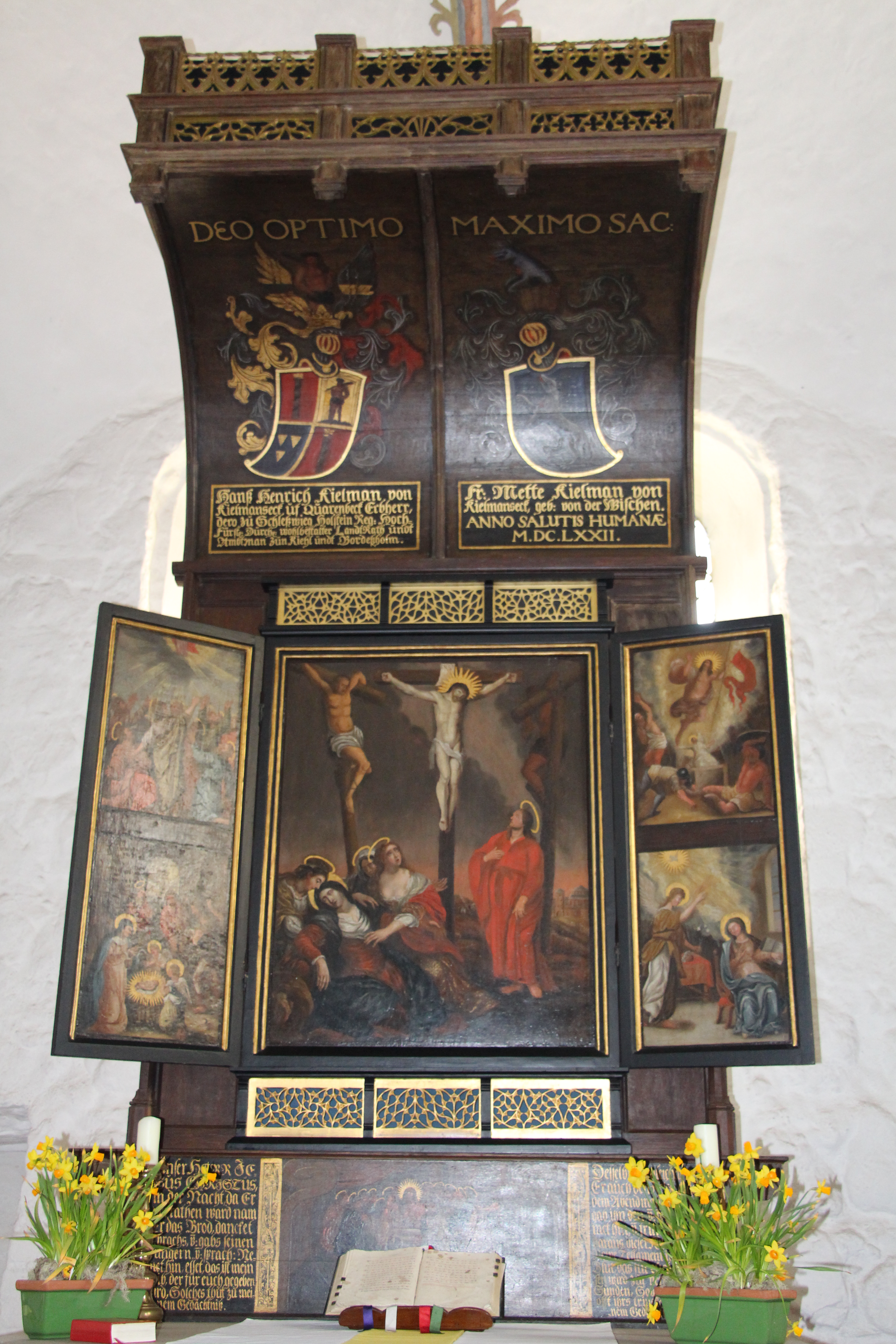 Baldachinaltar in der Brügger Johanniskirche